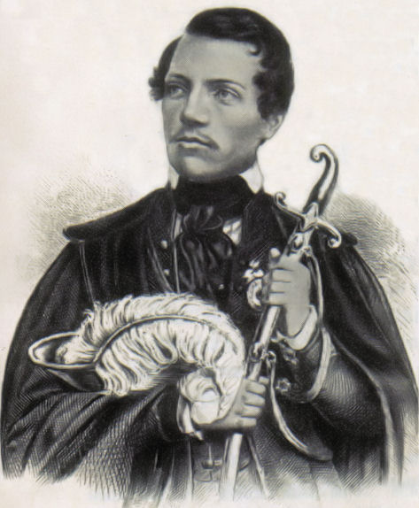 Vasvári Pál (1826–1848) történész, politikus, honvéd őrnagy portréja. Barabás Miklós litográfiája